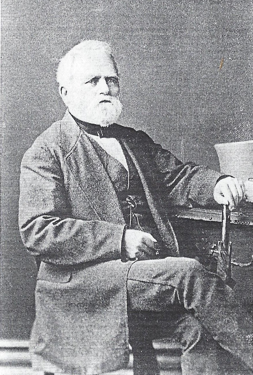 Fotografie von Wilhelm von Bismarck-Briest (1803—1877)